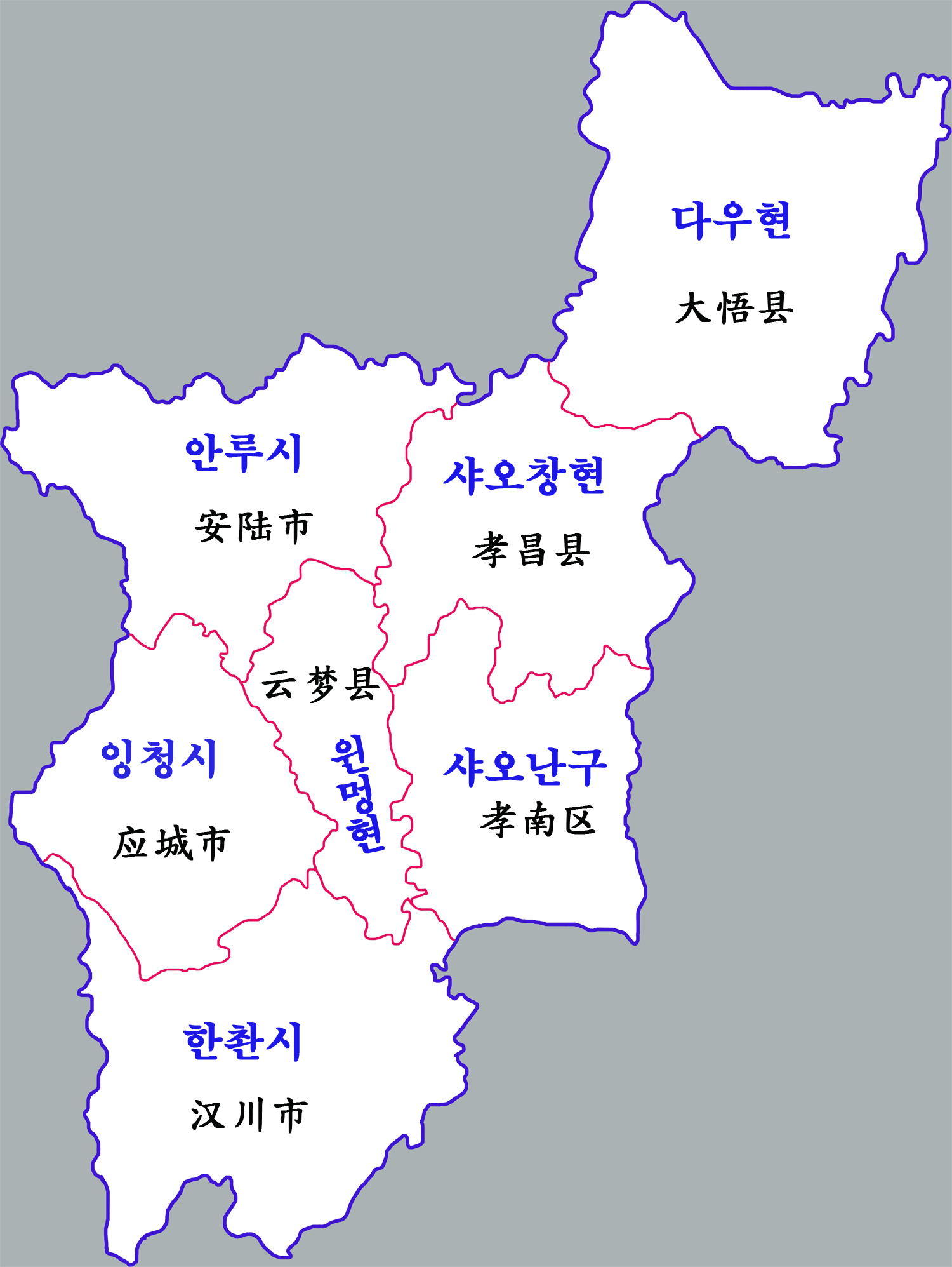 샤오간 현급구역